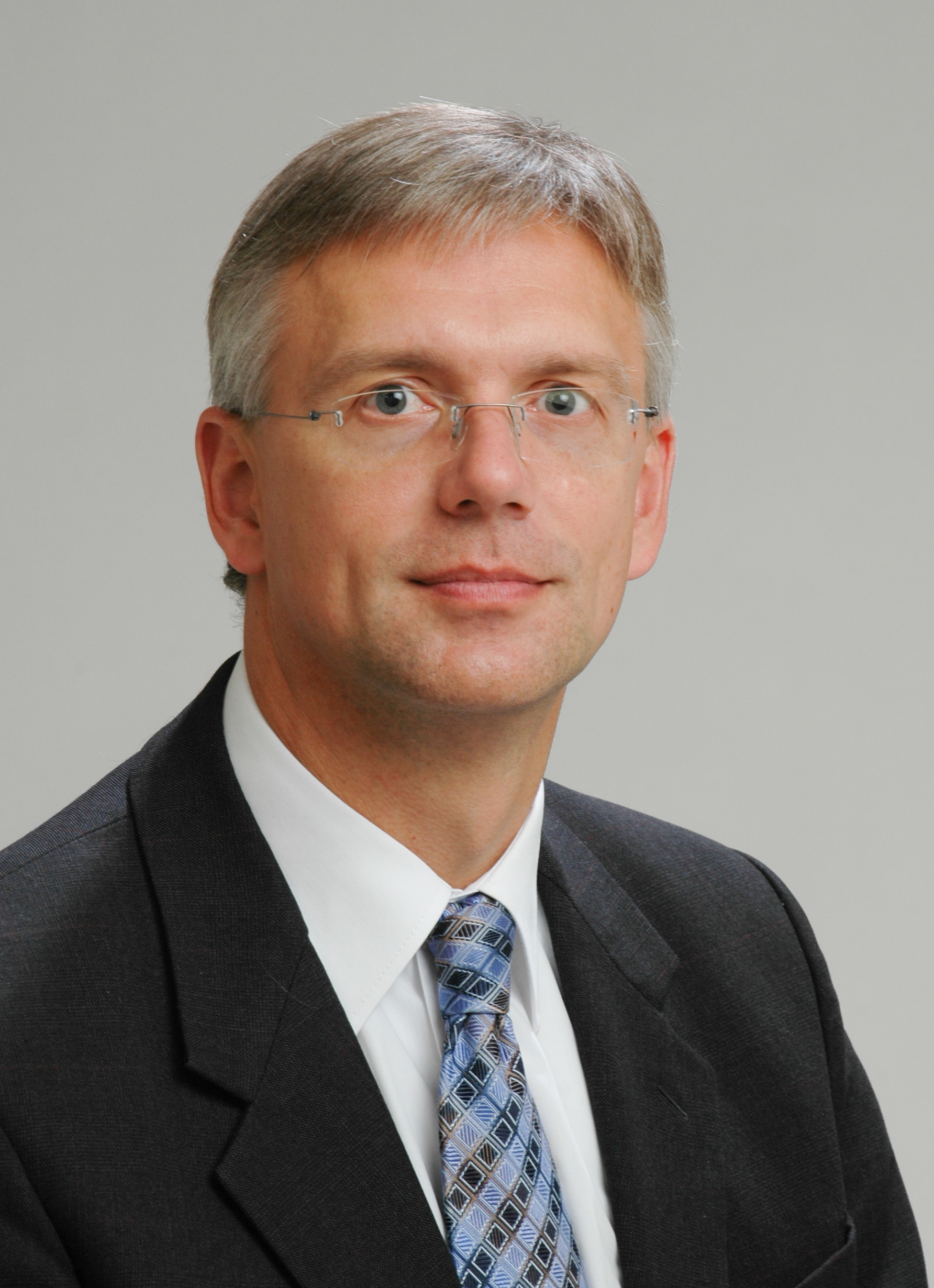 Foto: Saeima